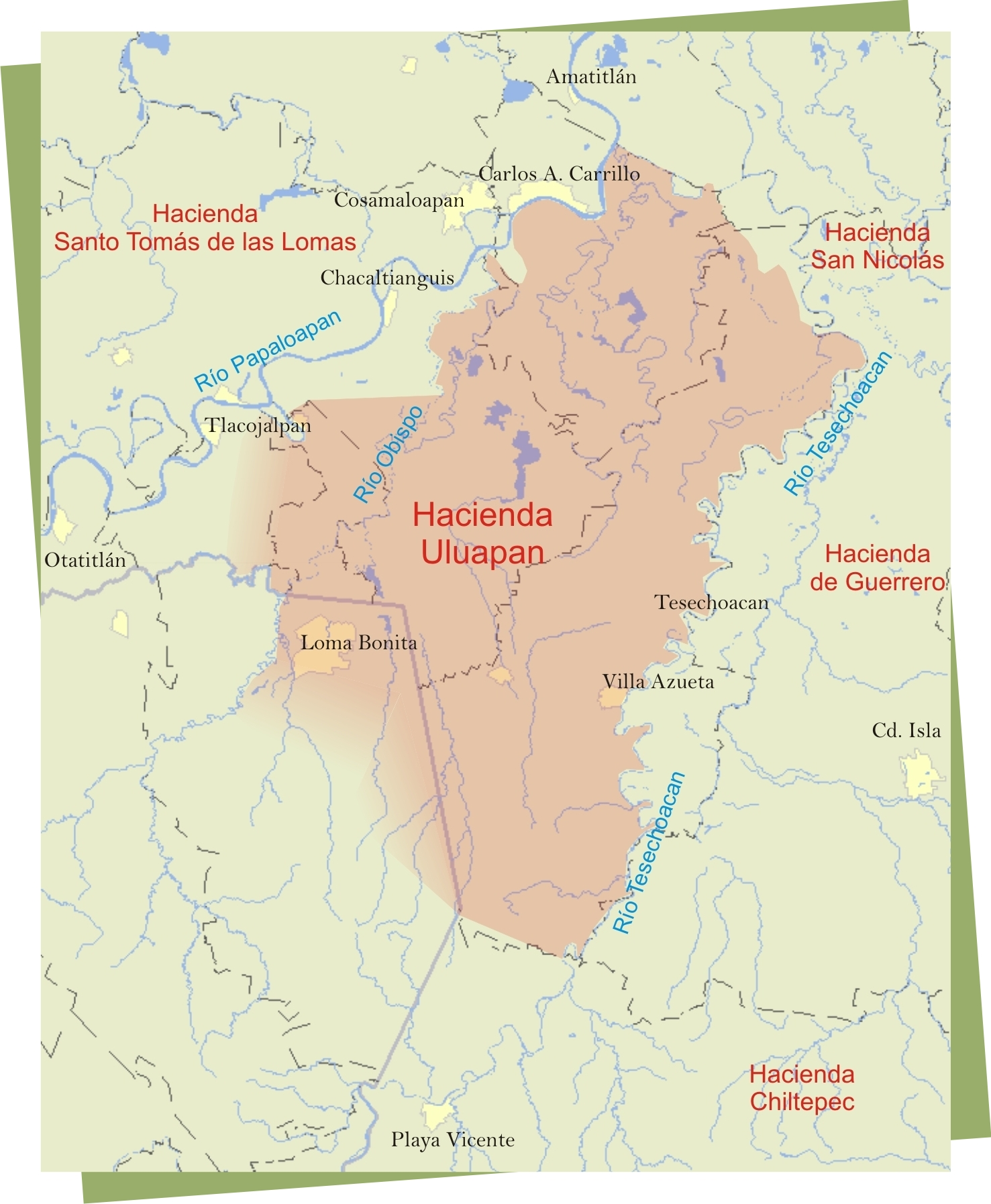 Mapa del territorio de la Hacienda de Uluapa a finales del siglo XVIII y principios del siglo XIX.